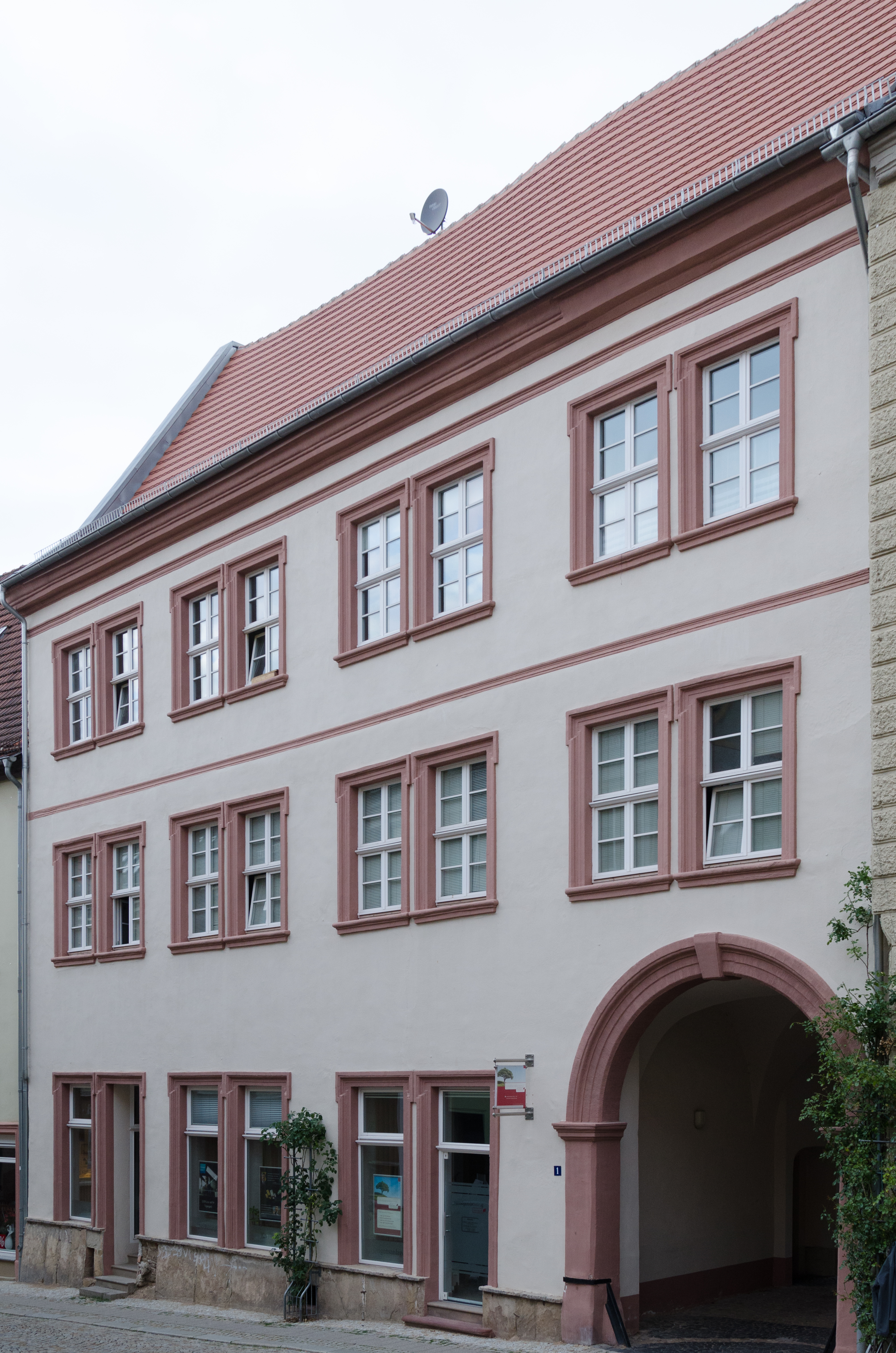 Sangerhausen, Kornmarkt 1